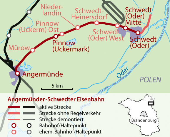 Karte der Angermünde-Schwedter Eisenbahn